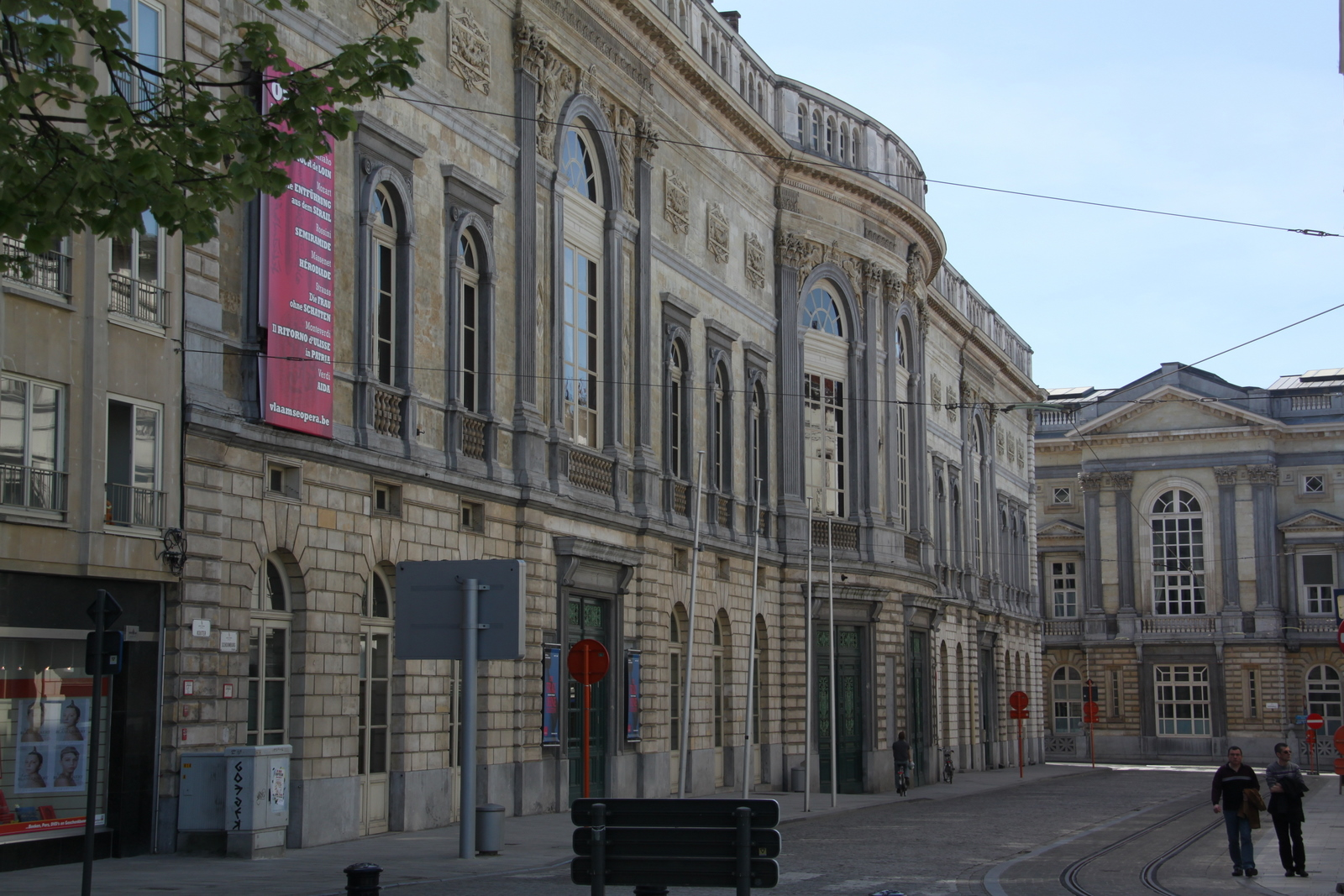 Ghent, Belgium on 2011-04-10